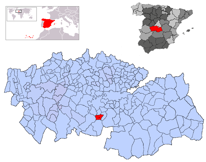 Cuerva en la provincia de Toledo